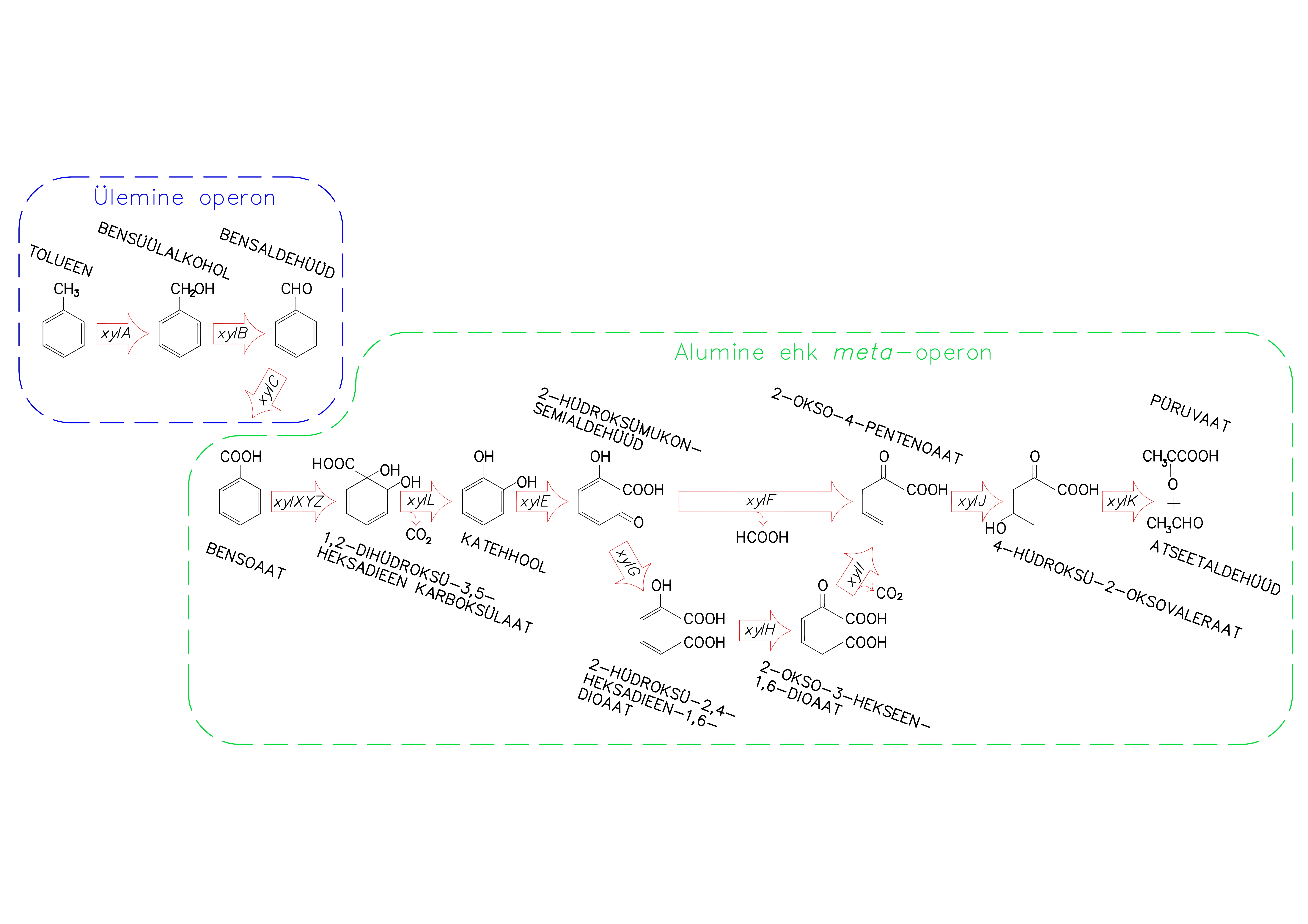 Tolueeni lagundamisrada